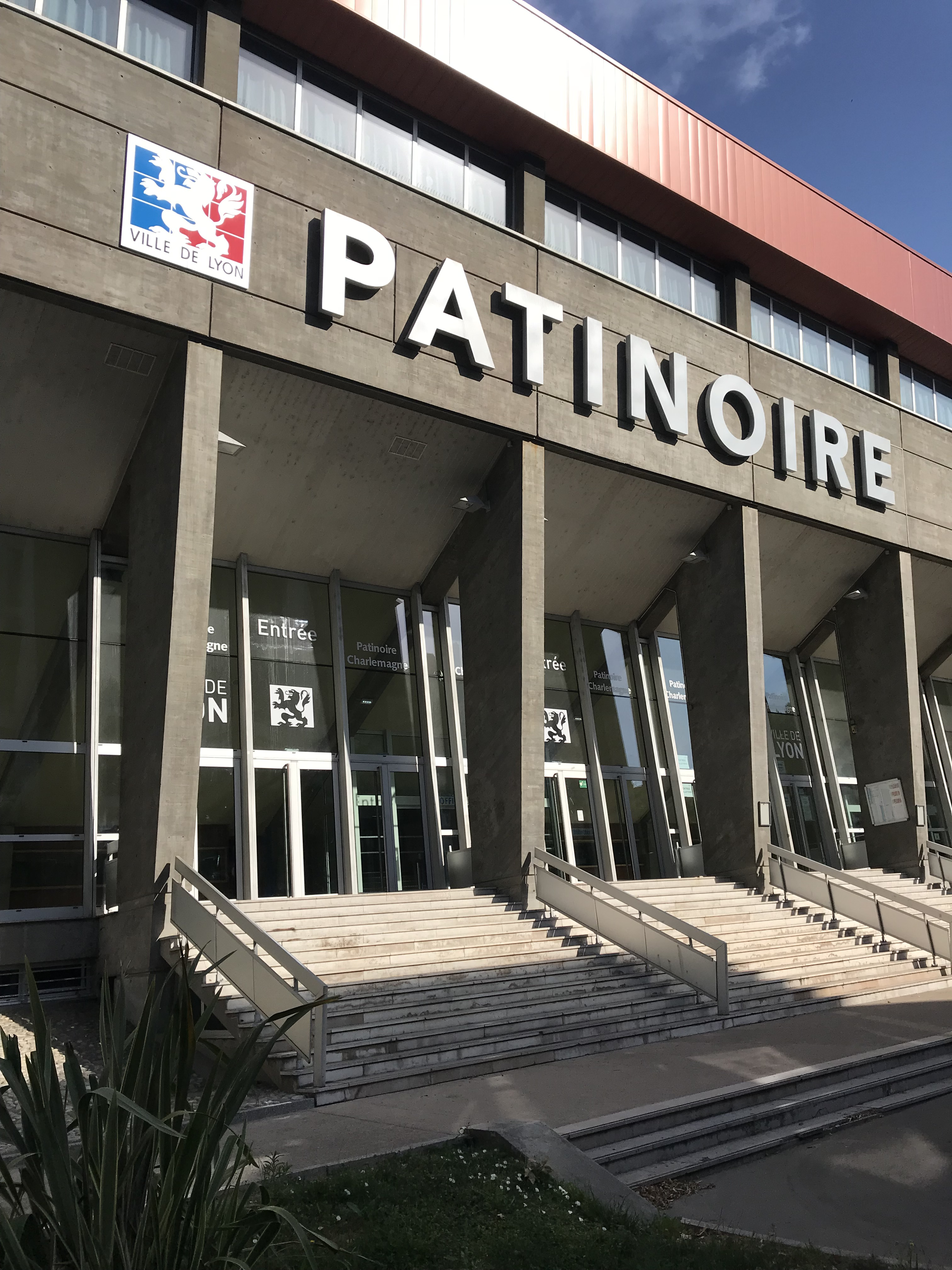 Image de Lyon, le premier juin 2018.